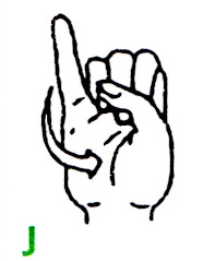 Buchstabe J im deutschen Fingeralphabet, gemäß der Infokarte des Landesverbandes Bayern der Gehörlosen e.V. (